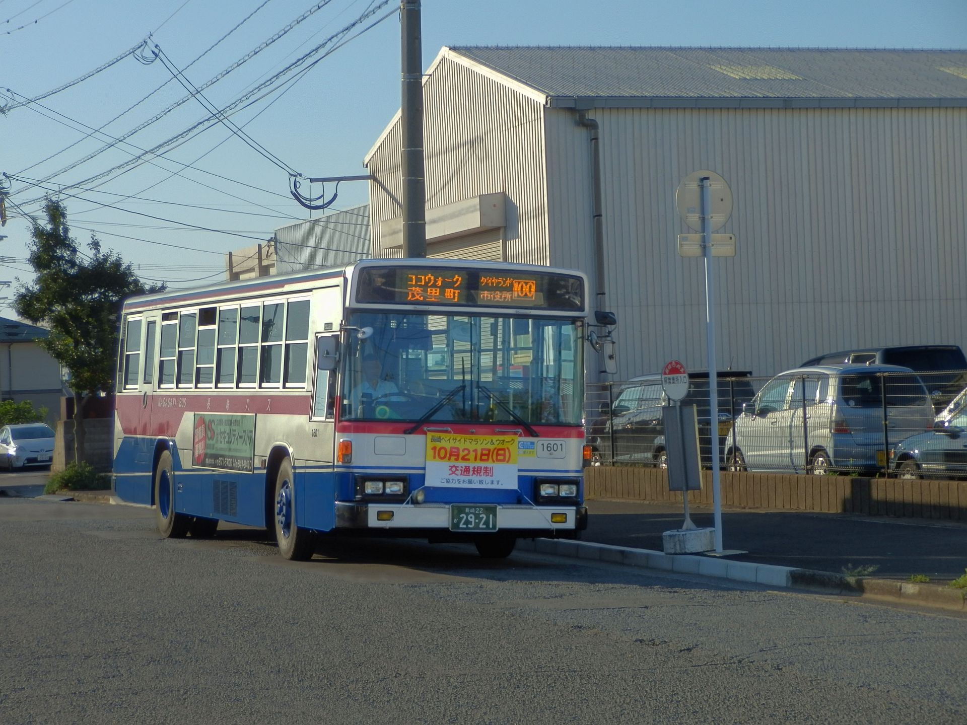 長崎バス柳営業所入口バス停